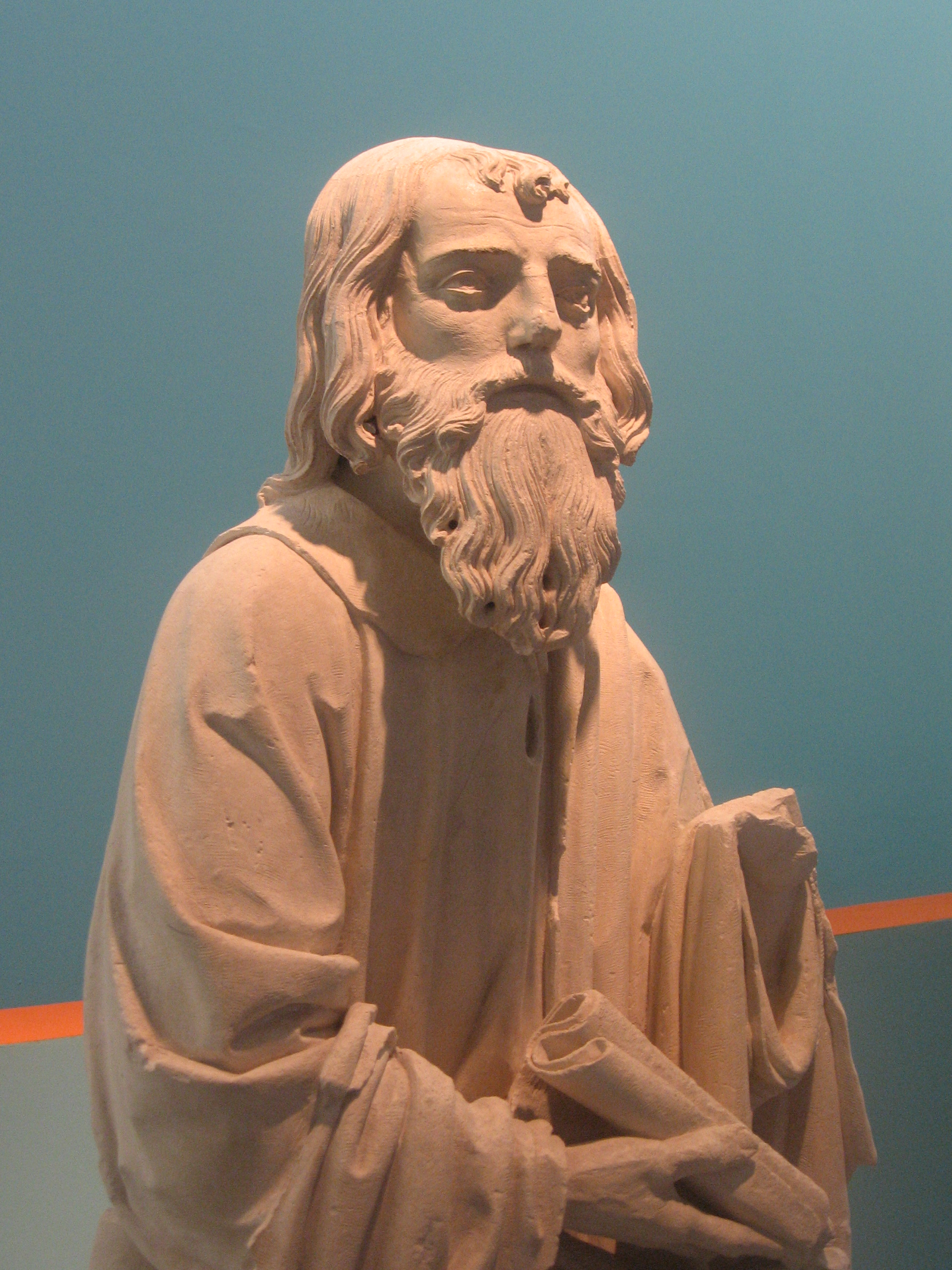 Exposition "Le Beau XVIe siècle". Saint Paul XVIe siècle. Statue, calcaire avec traces de polychromie. Saint Pouange (Aube) Classé Monument historique le 27.12.1913